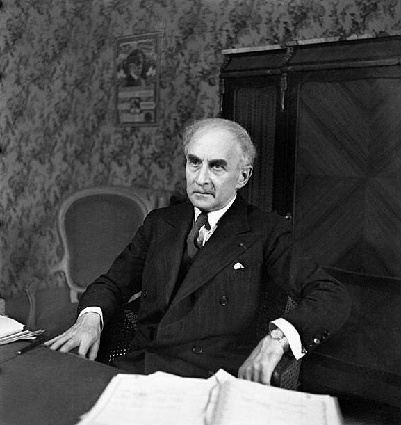 Abel Bonnard, ministre de l'Éducation nationale du régime de Vichy.